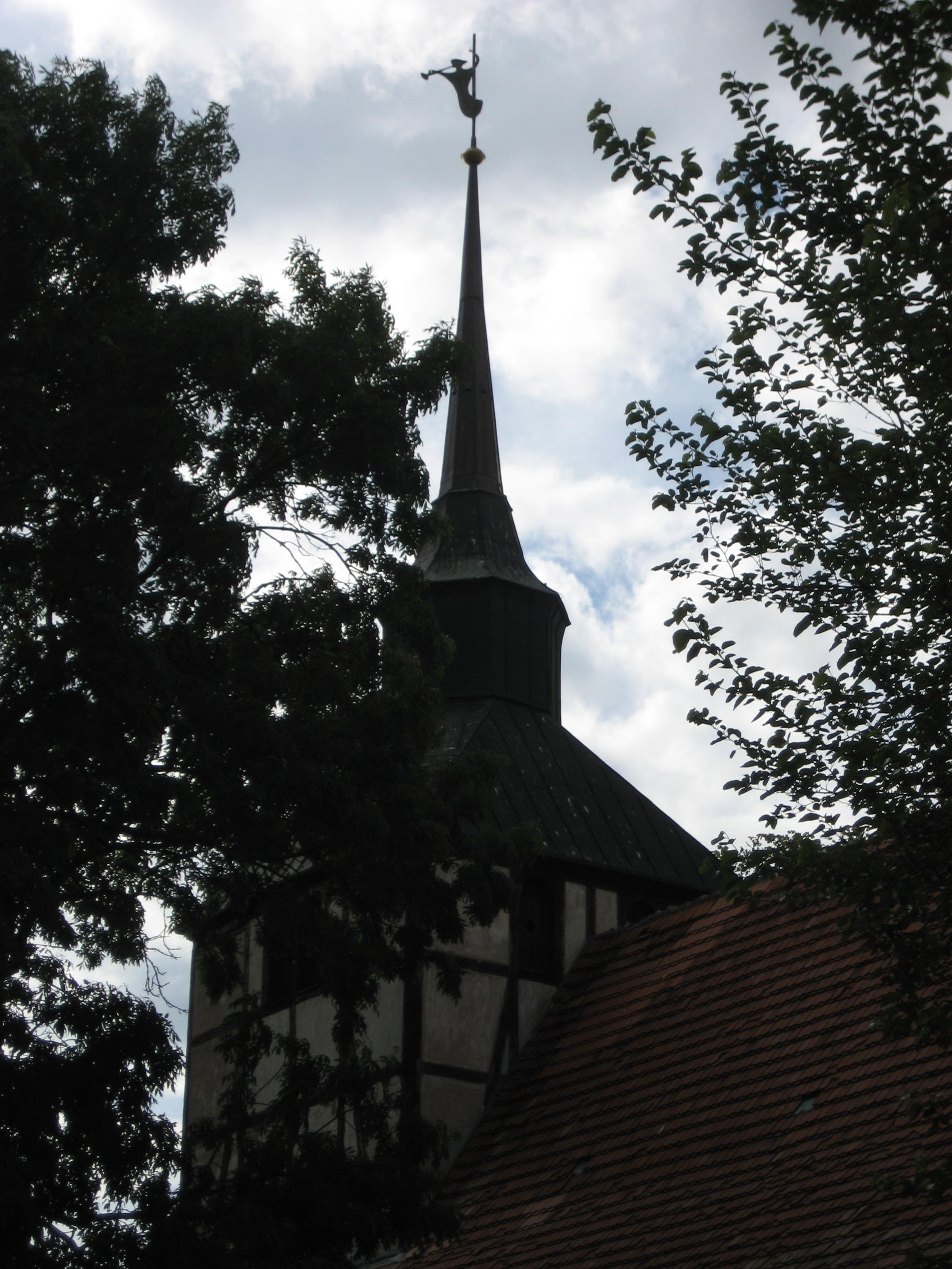 Kirchturm der Kirche Grambow.